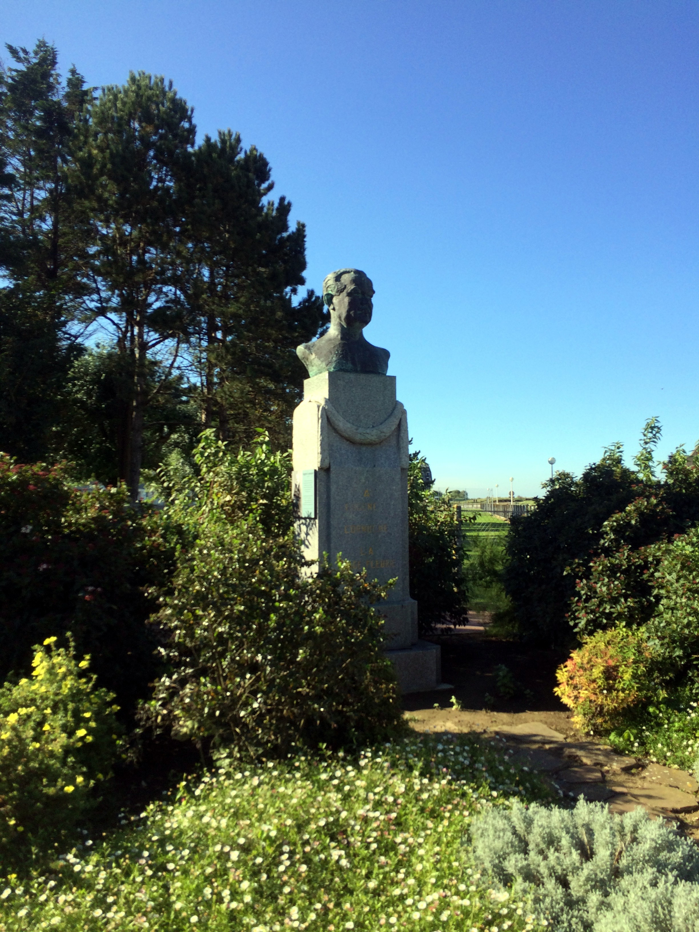 A Deauville statue de l'animateur de la station au début du XXème siècle.